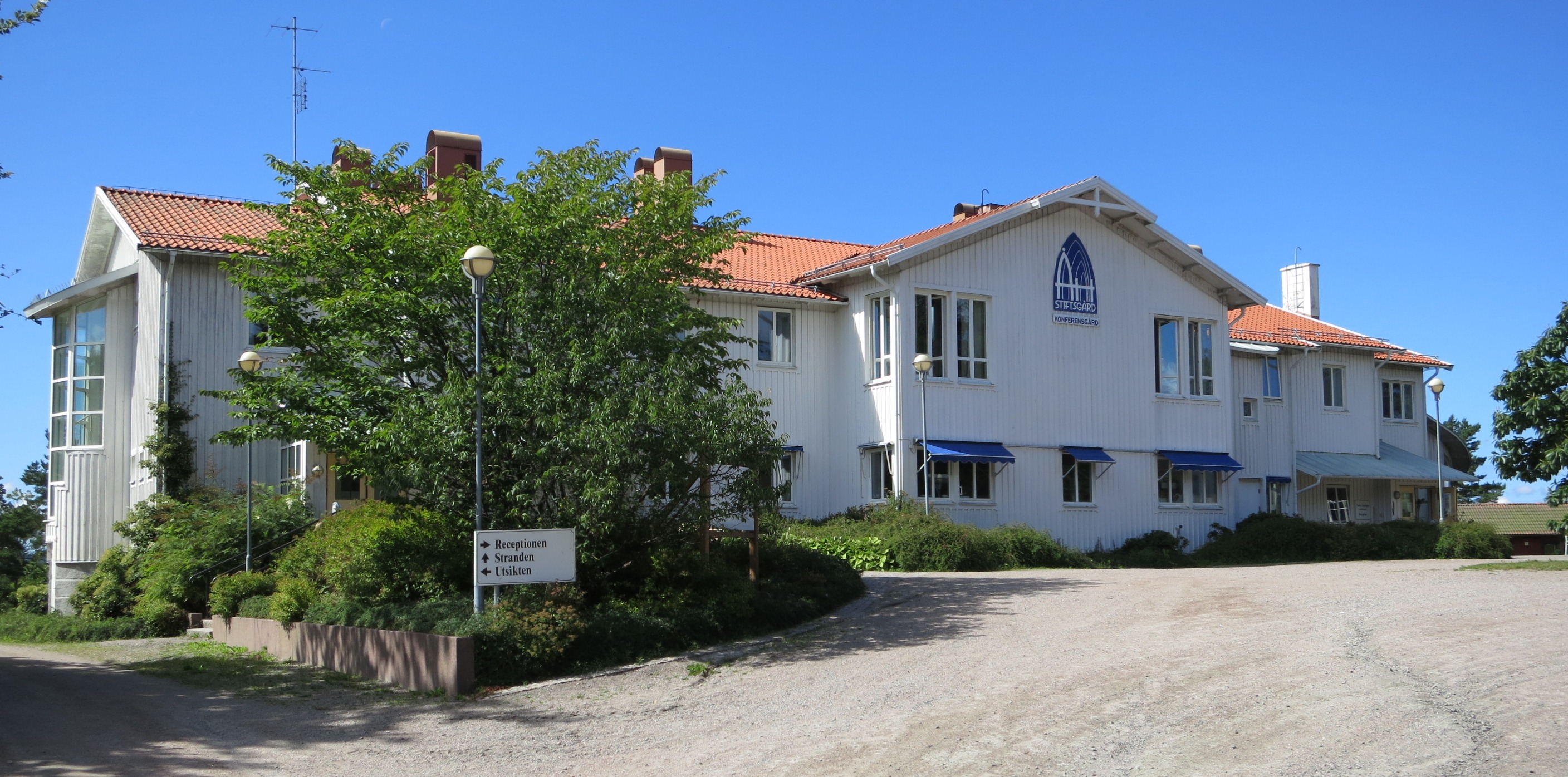 Åh stiftsgård i Bohuslän i Göteborgs stift, huvudbyggnad.